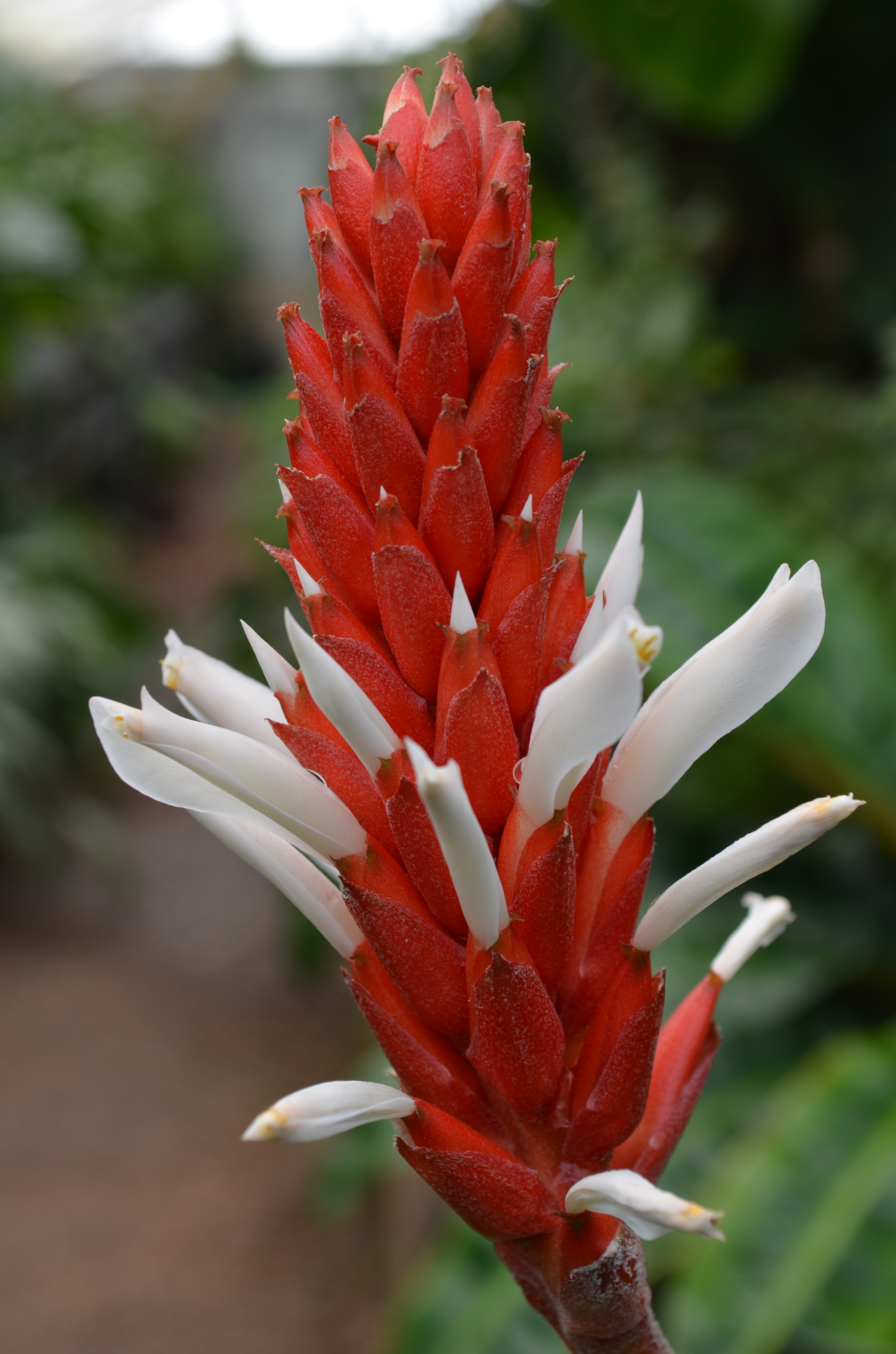 Spécimen de Pitcairnia olivaestevae, cultivé dans les serres du jardin botanique de Lyon au parc de la Tête-d'Or